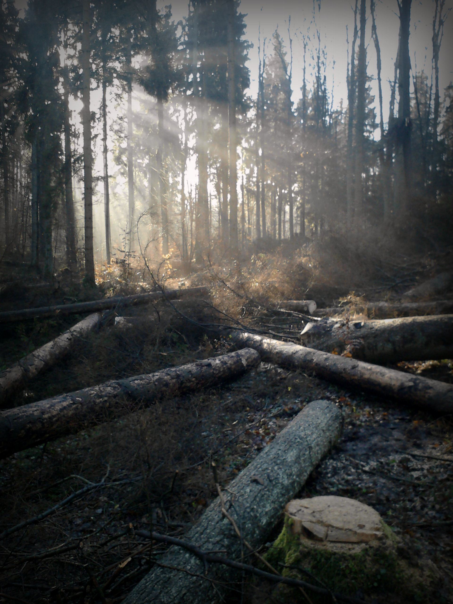 Autor: Adrian Grzegorz 25.11.2012r.